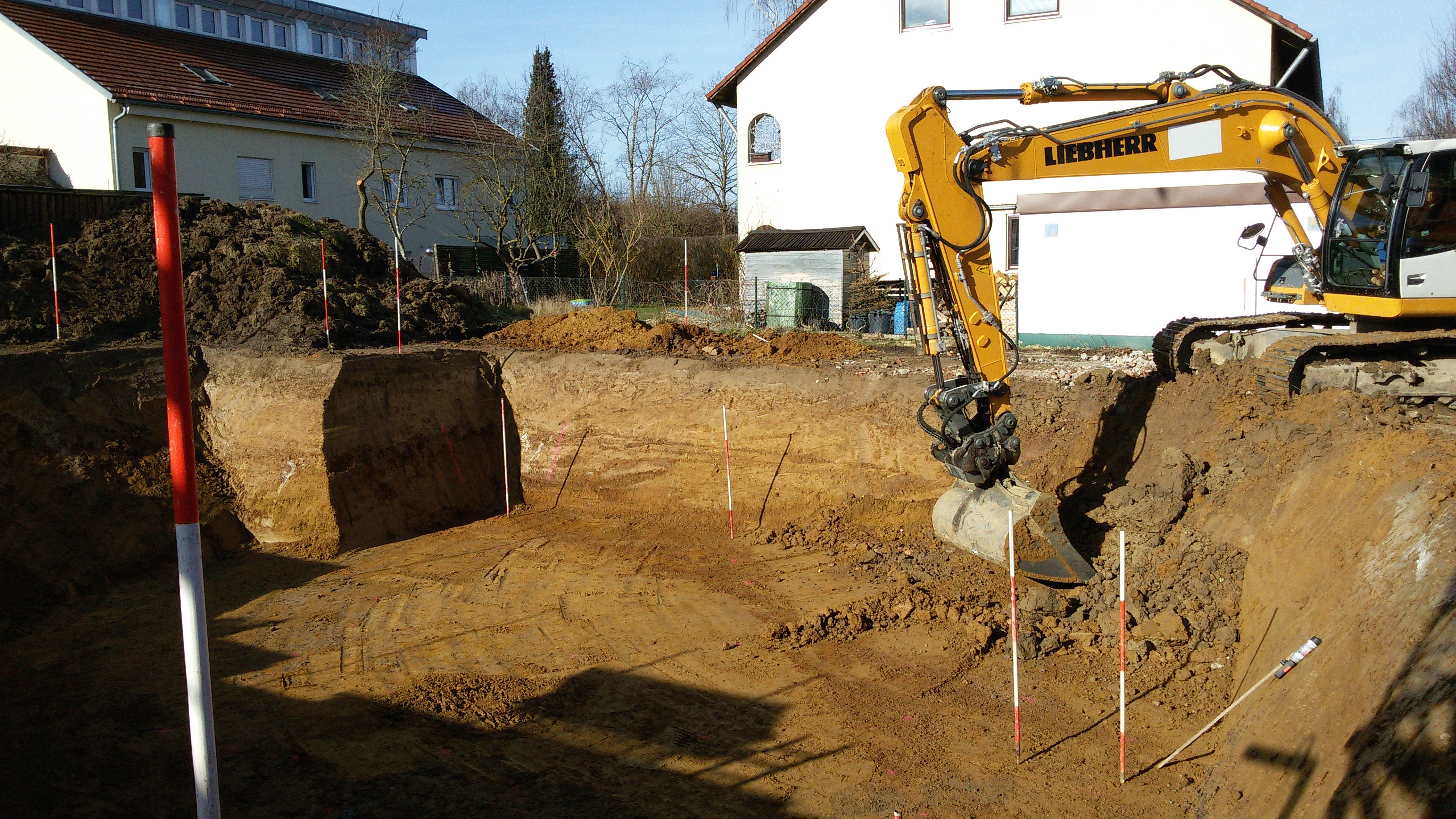 Kettenbagger bei der Herstellung einer Baugrube für ein Einfamilienhaus.